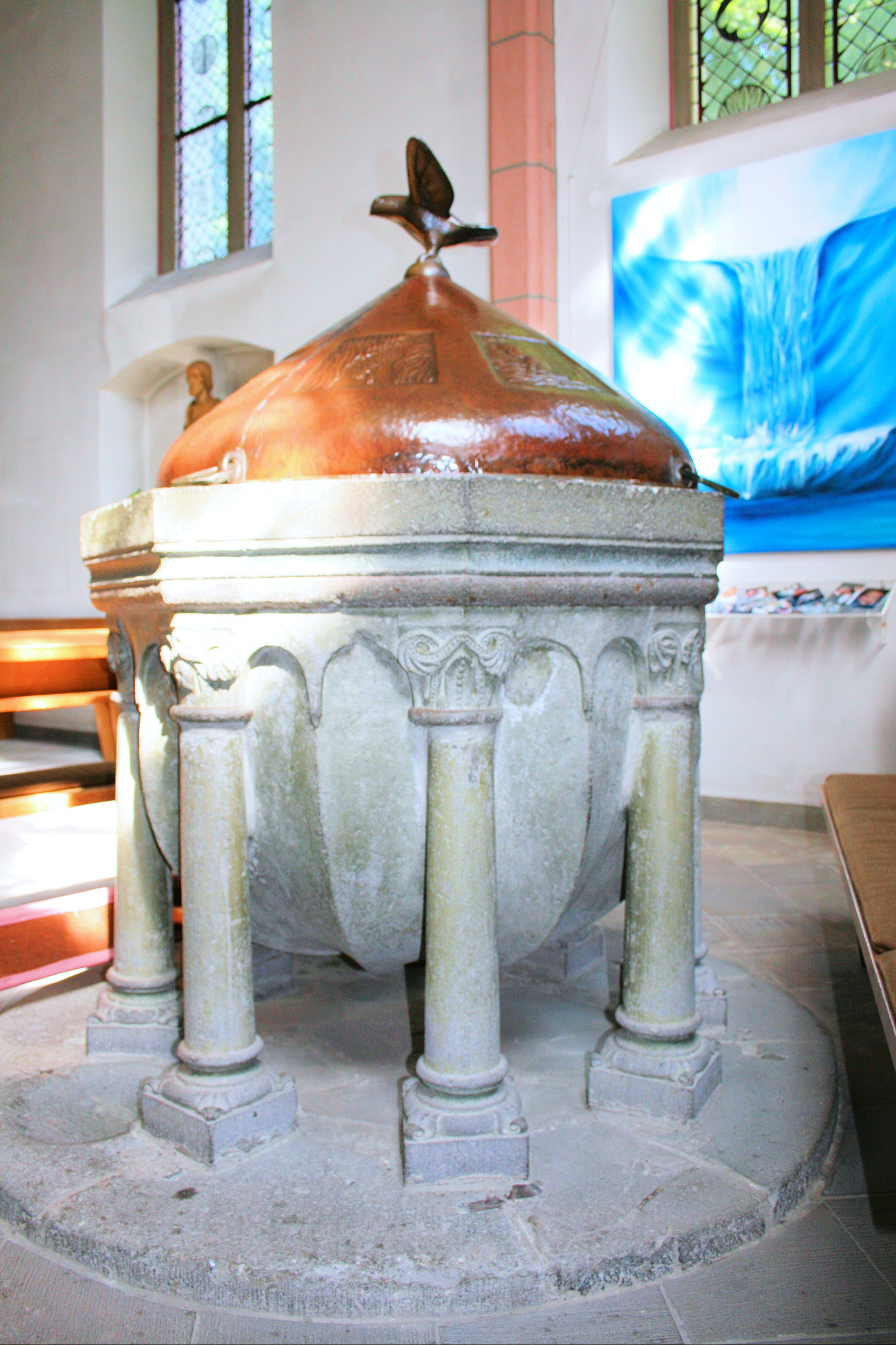 Much, Kirche St. Martin